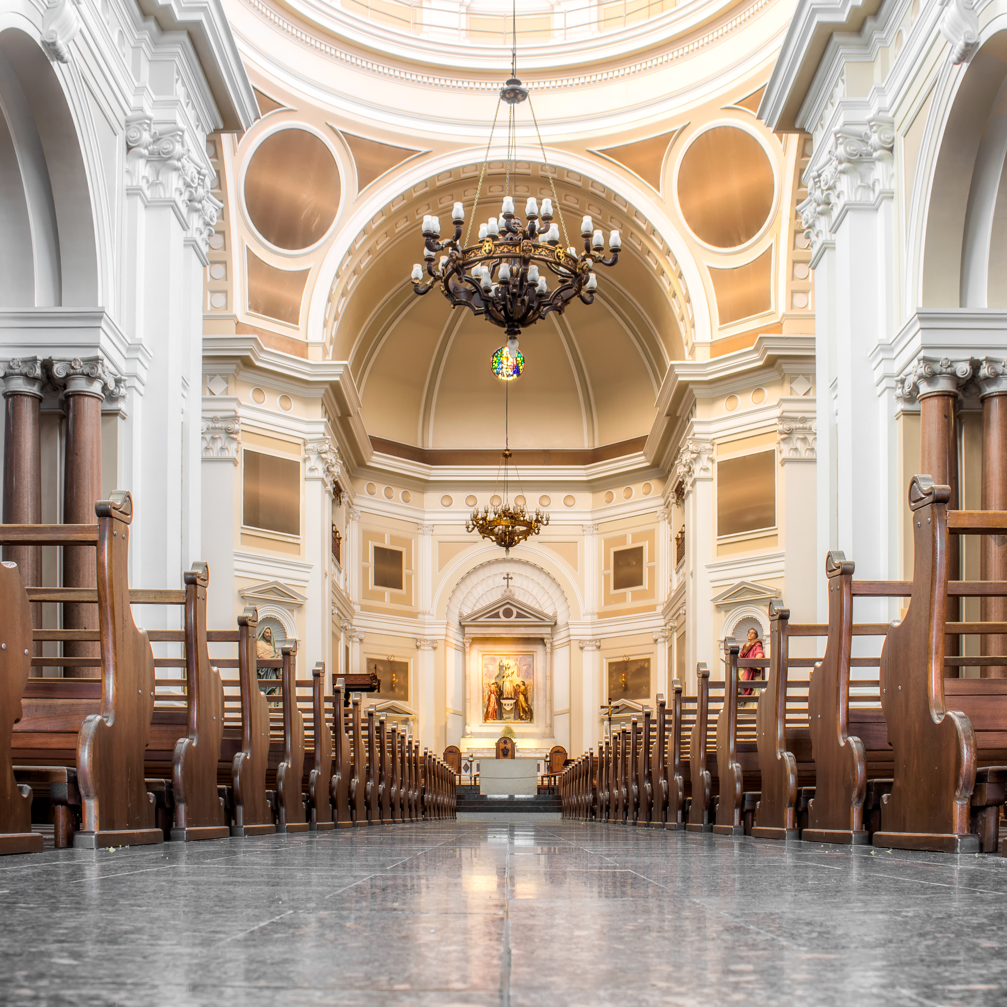 Cúpula da catedral Metropolitana de Porto Alegre, Porto Alegre, Rio Grande do Sul, Brasil.